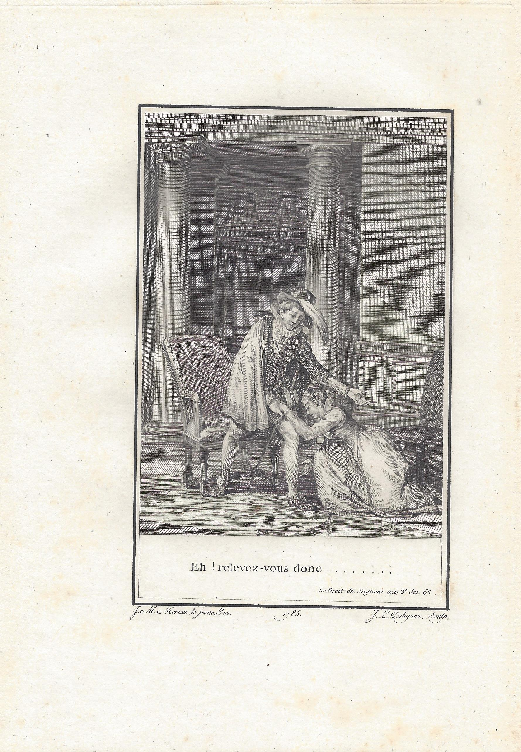 Voltaire: Le Droit du Seigneur Akt 3 Szene 6 Kupferstich von J. L. Delignon nach Jean-Michel Moreau